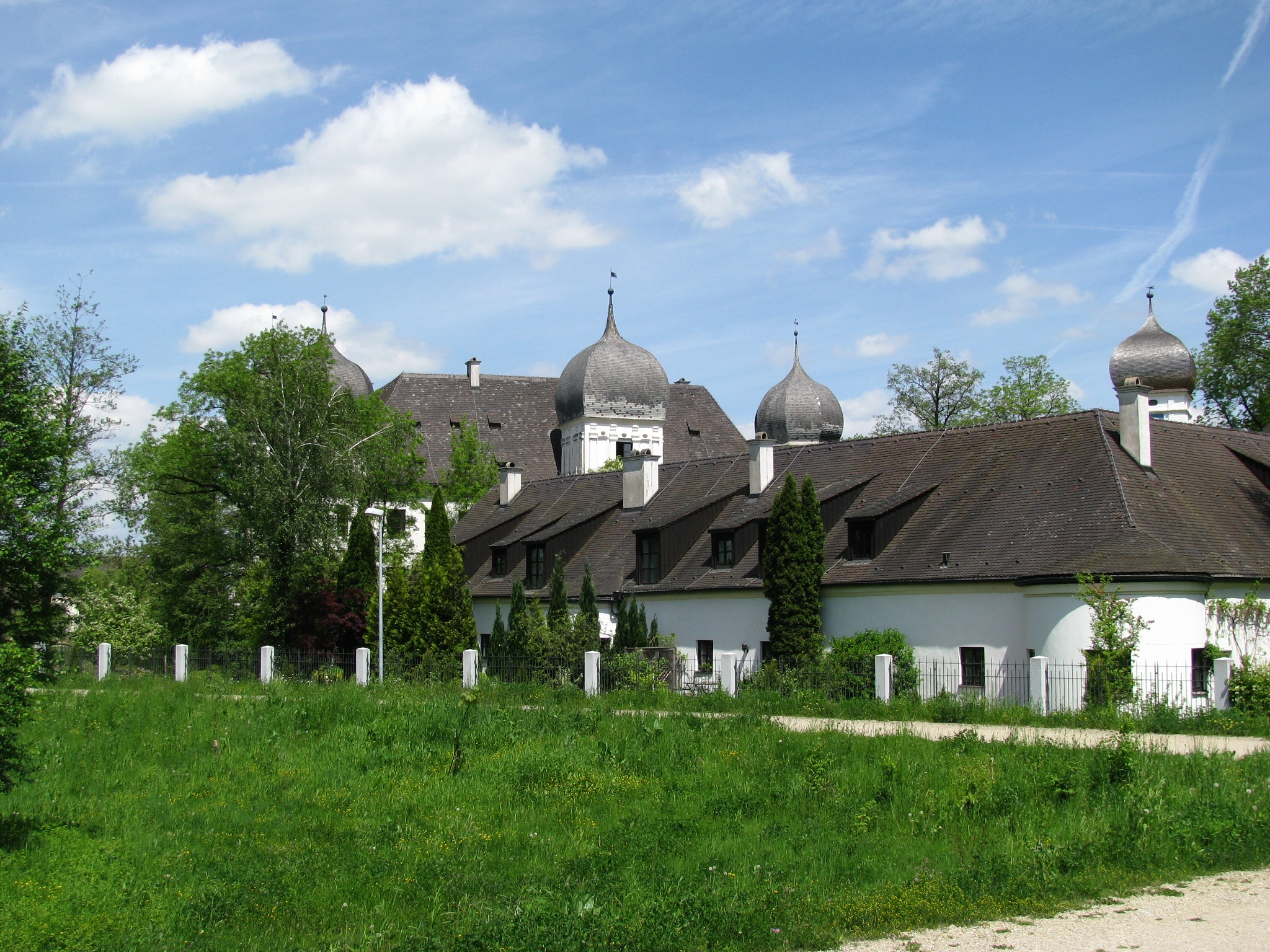 Schloss Schwindegg, ein Renaissance-Wasserschloss in der Ortsmitte von Schwindegg, einer ländlichen Gemeinde im oberbayerischen Landkreis Mühldorf am Inn. Ansicht aus südlicher Richtung, mit Wirtschaftsgebäude im Vordergrund.